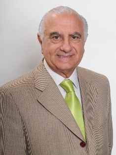 Joaquín Tuma Zedan, político chileno.